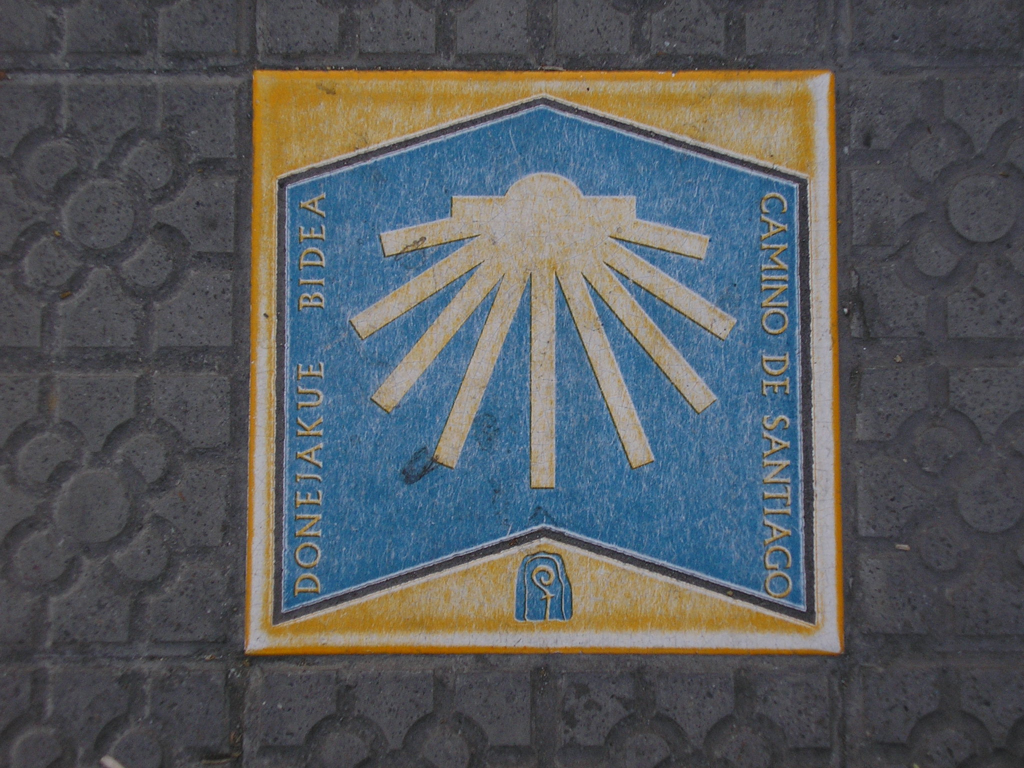 Fußwegmarkierung des Jakobsweges in Bilbao (rechts spanisch, links in baskischer Sprache)